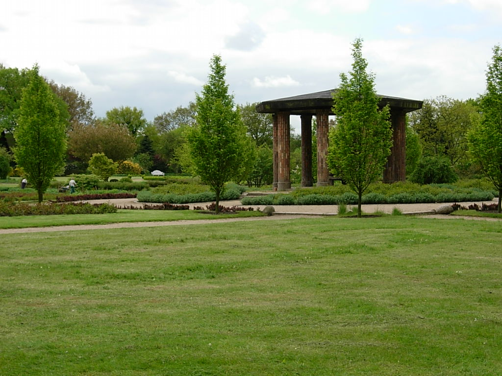 Schulgarten.